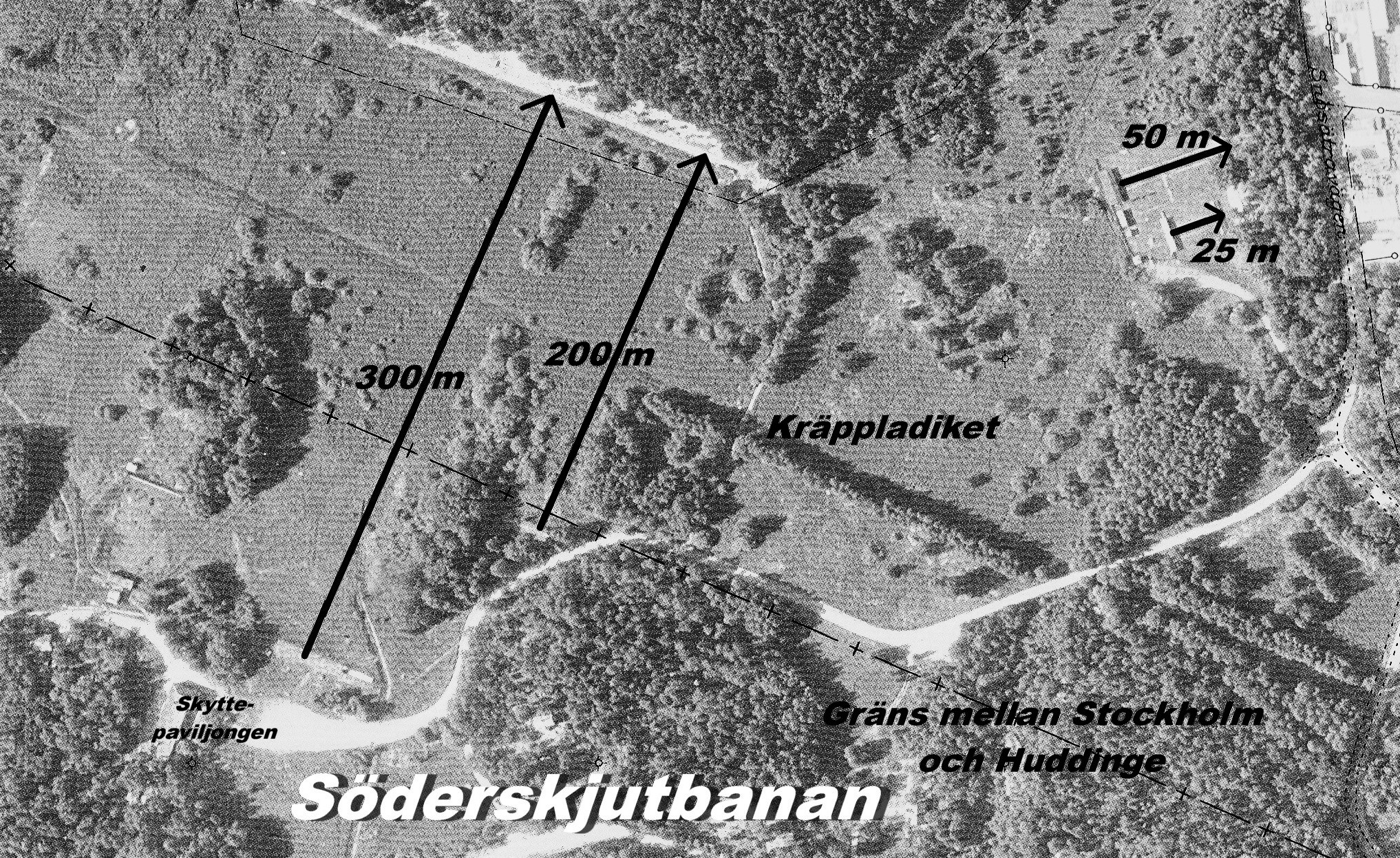 Söderskjutbanan belägen på gränsen mellan Rågsved i Stockholms kommun och Stuvsta i Huddinge kommun. Verksamheten började på 1940-talet och avvecklades successivt mellan 1975 och 1984. Bakgrundsfoto från Stockholms stadsbyggnadskontor. Grafik Holger Ellgaard.